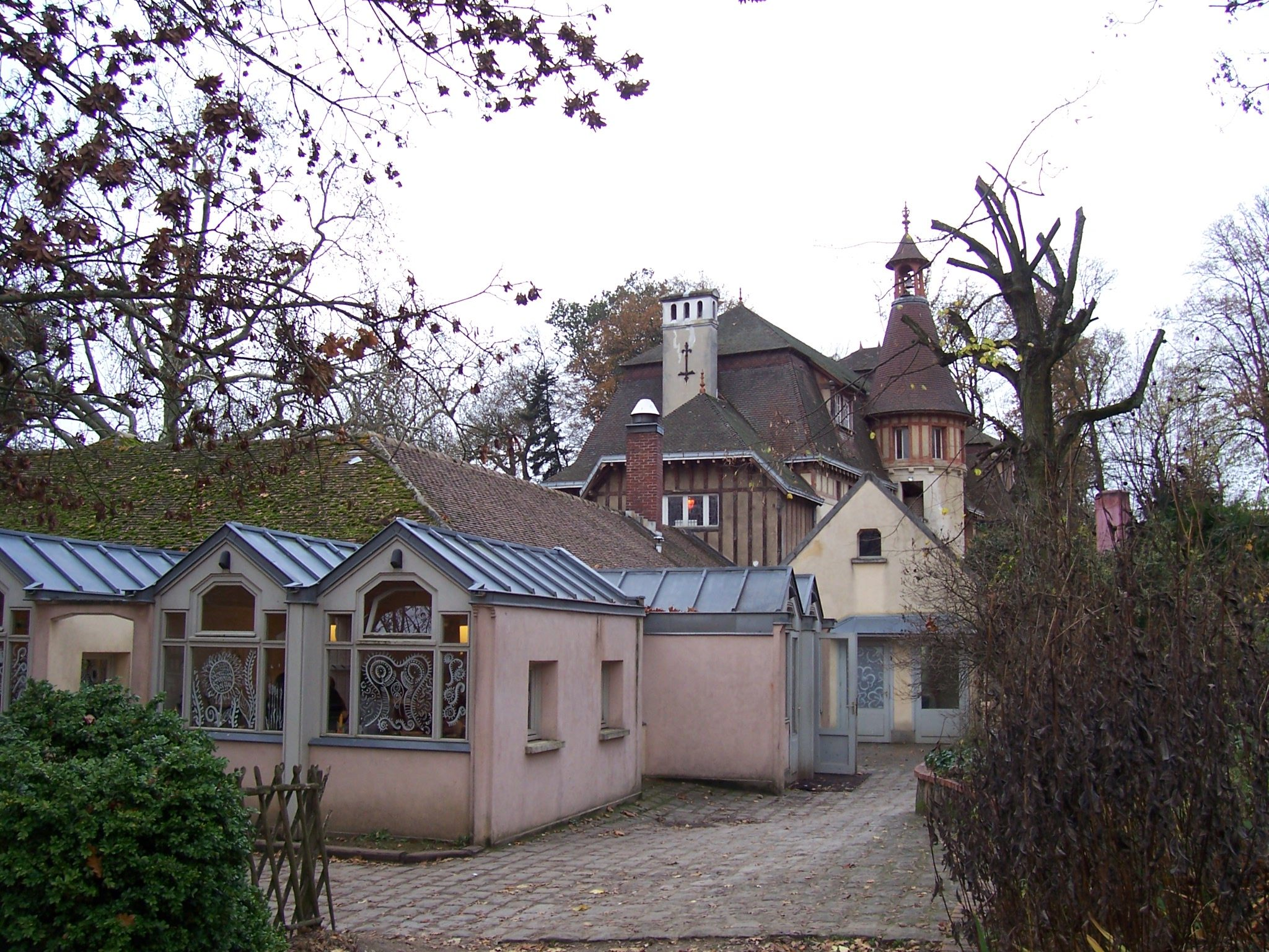 Ecole Steiner-Waldorf Verrieres le Buisson (France)